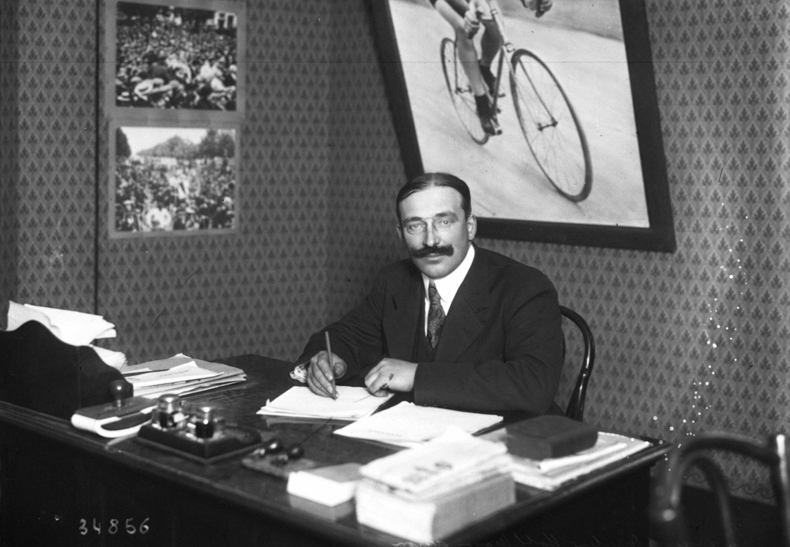 Ludovic Feuillet, directeur sportif de la maison Alcyon